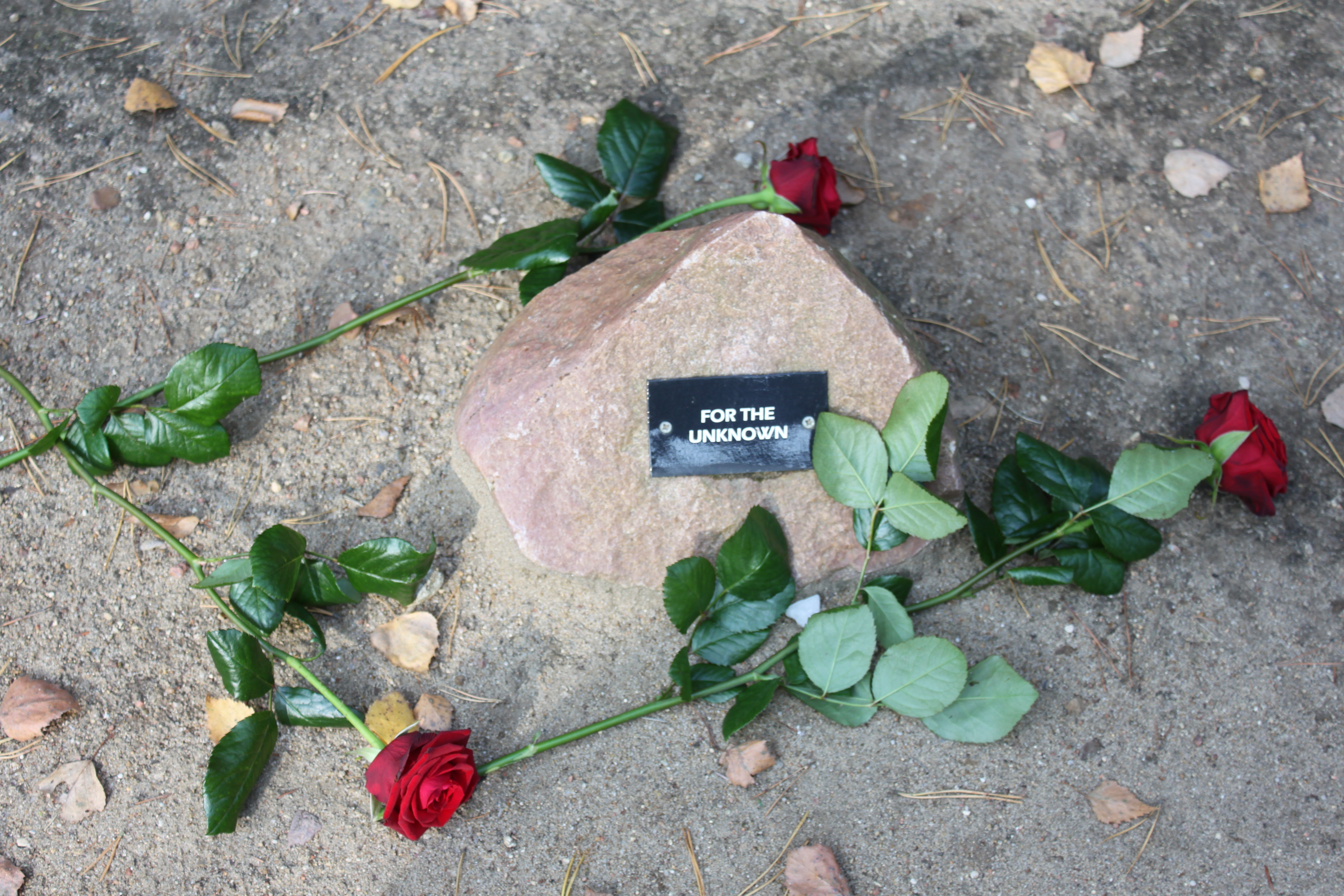 FOR THE UNKNOWN